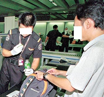 中文（香港）: 機場保安有限公司-搜查旅客(黑色上衣)